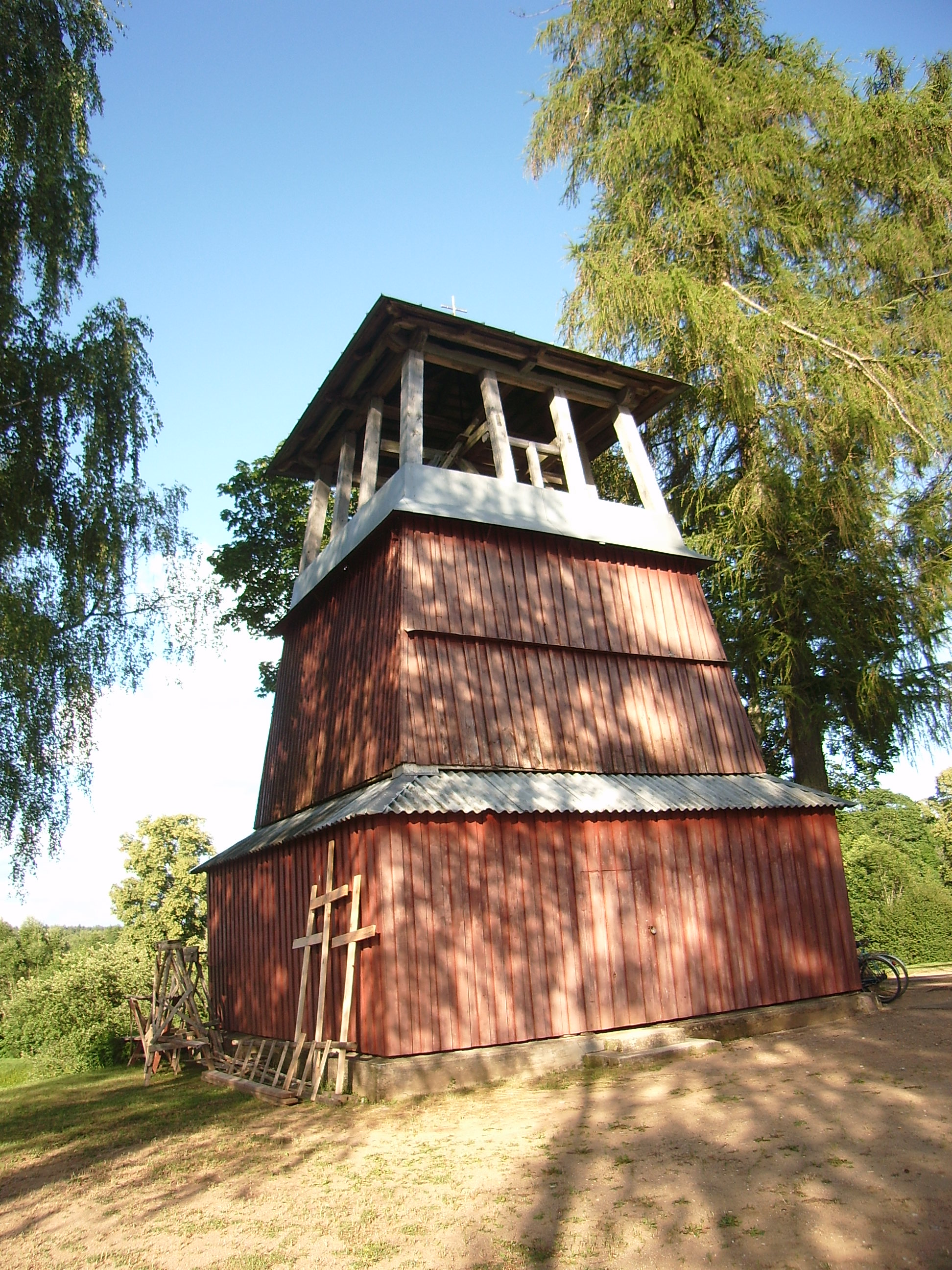 Беларуская (тарашкевіца): Былая сядзіба К. Сулістроўскага: фрагмэнты парку уязная алея сыстэма сажалак касьцёл, званіца, плябанія гаспадарчы двор руіны сьпіртзавода. в. Шэметава This is a photo of Belarusian heritage monument. Reference number: 613Г000464 ( WLM)